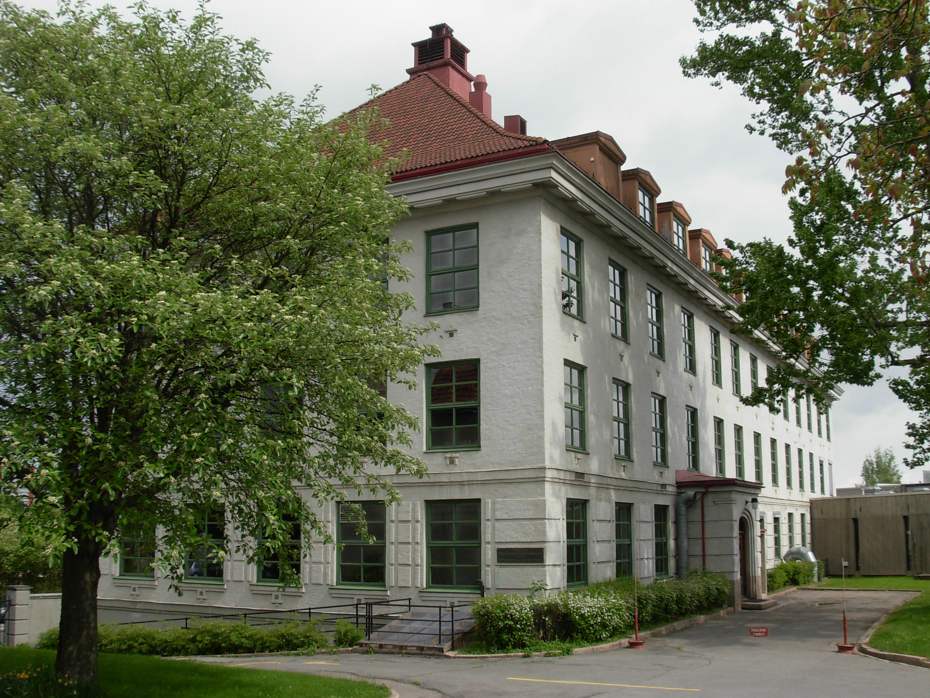 Nasjonalt folkehelseinstitutt (1930), Lovisenberg, Oslo